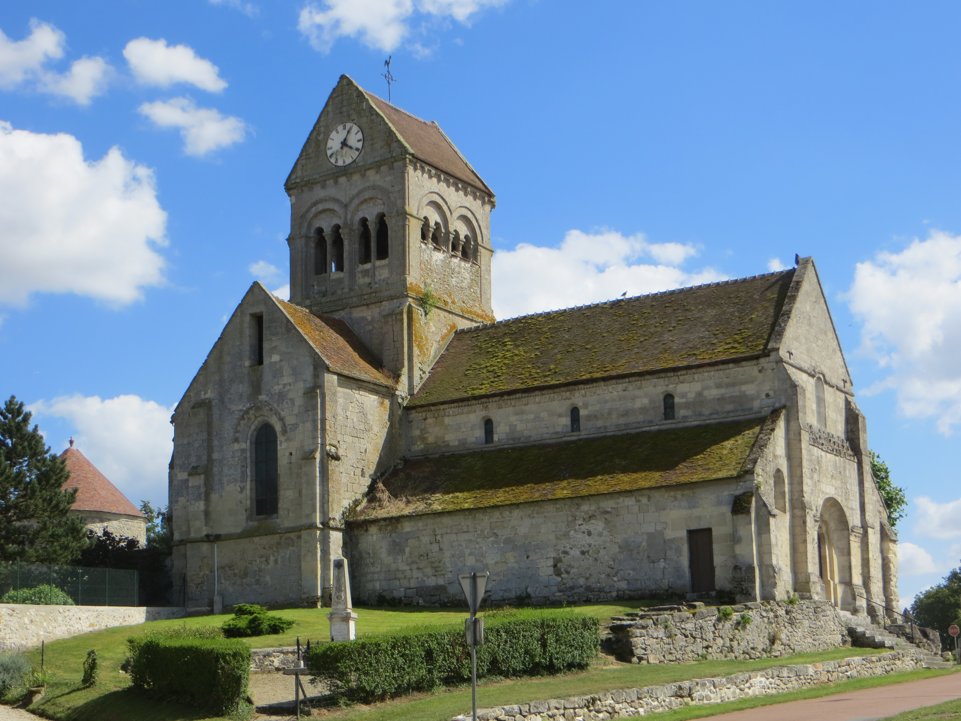 Vue générale de l'église